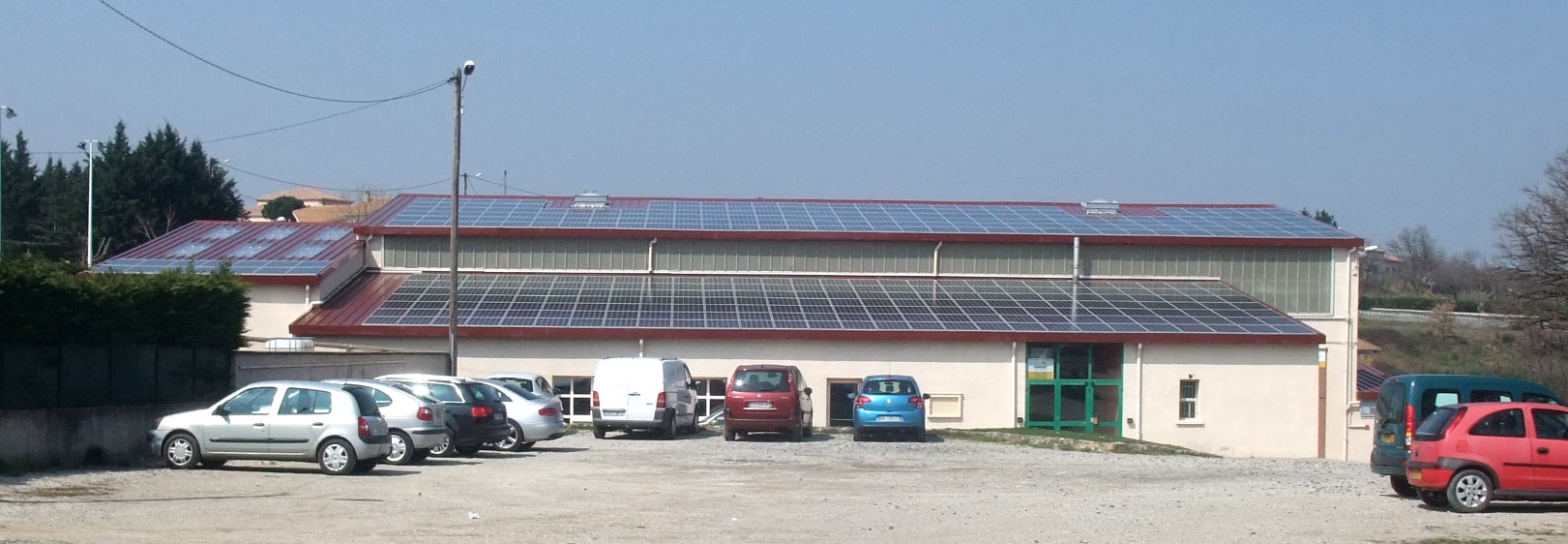 Talencieux salle polyvalente